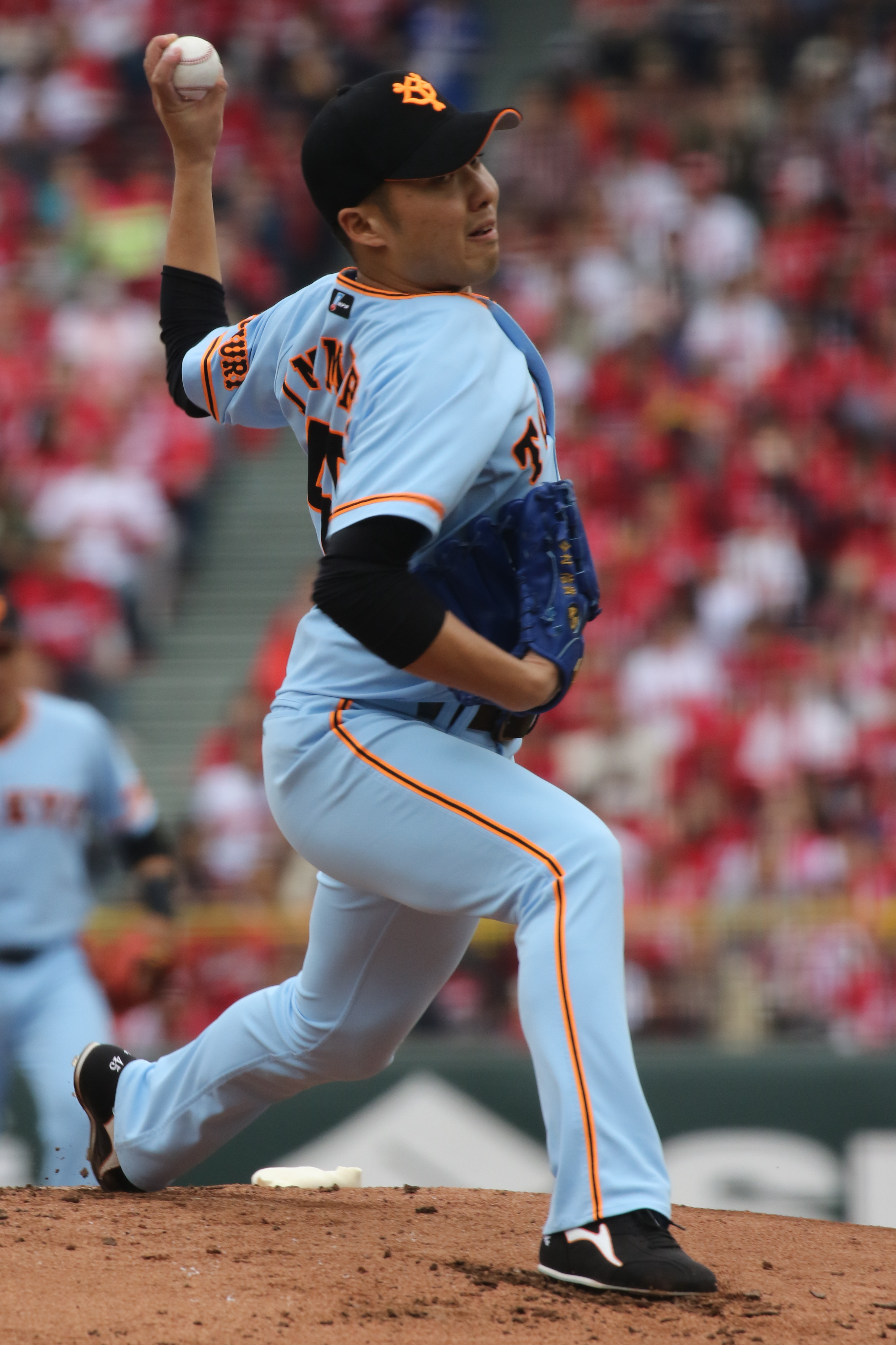 ジャイアンツ今村選手